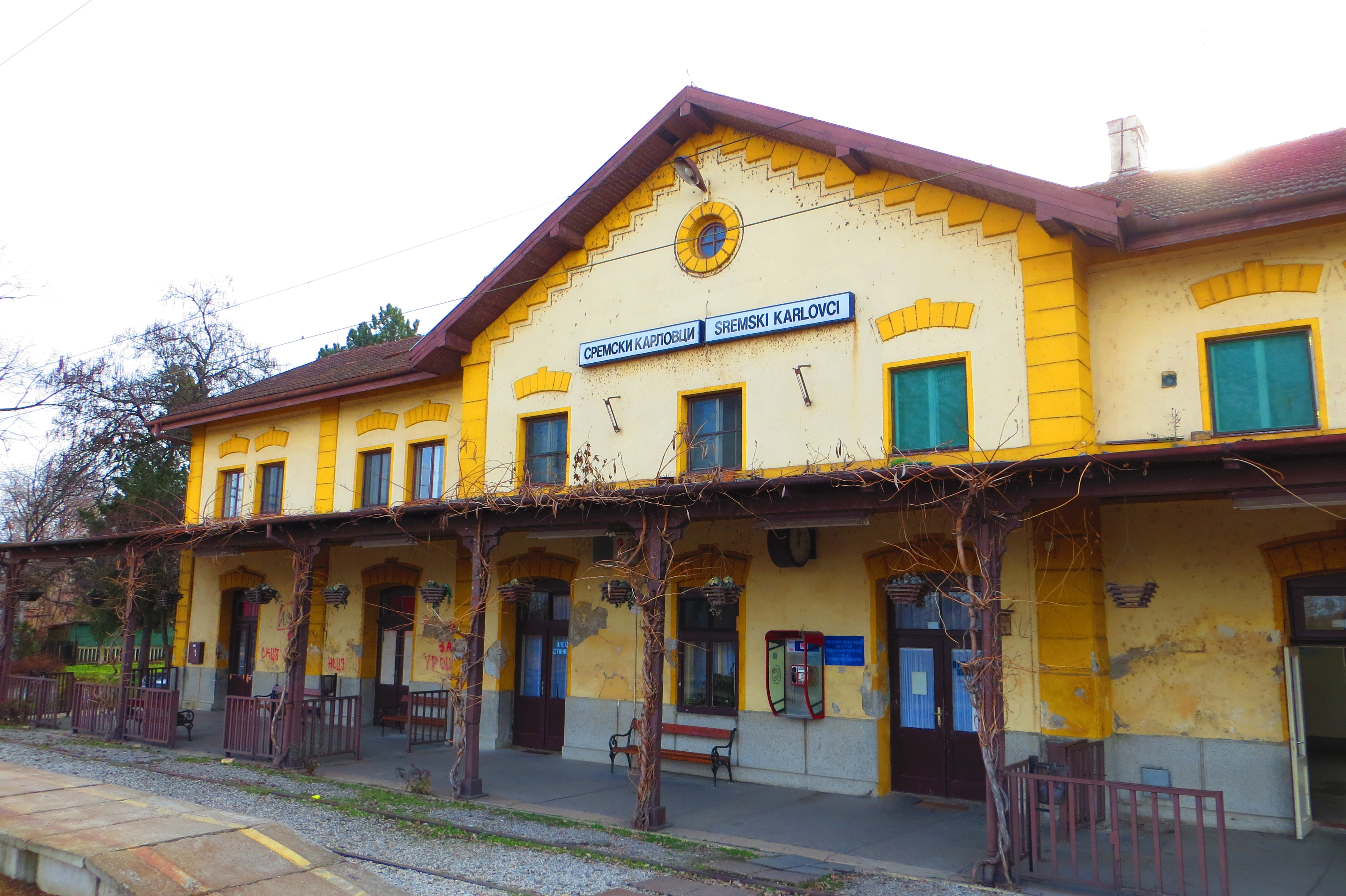 Železnička stanica